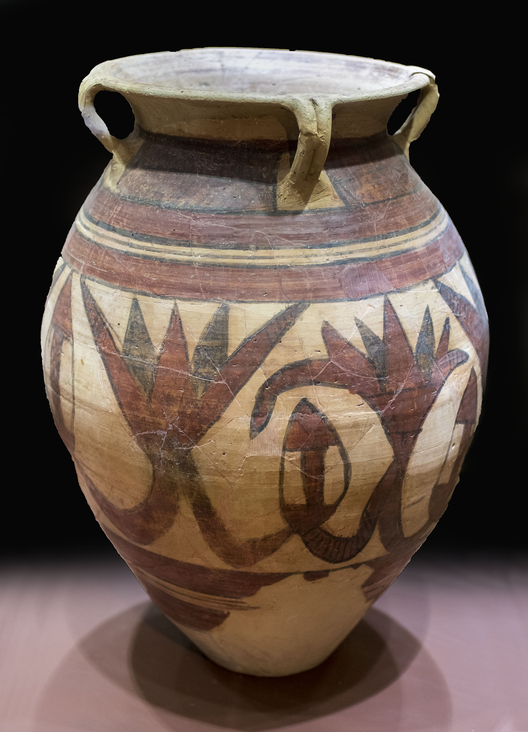 Mide unos 60 cm de altura por 45 de diámetro y se ha datado en el periodo 650-550 a.C. Se modeló en tres partes diferentes que se unieron antes de la cocción. Se expone en el Museo de Carmona, Sevilla.